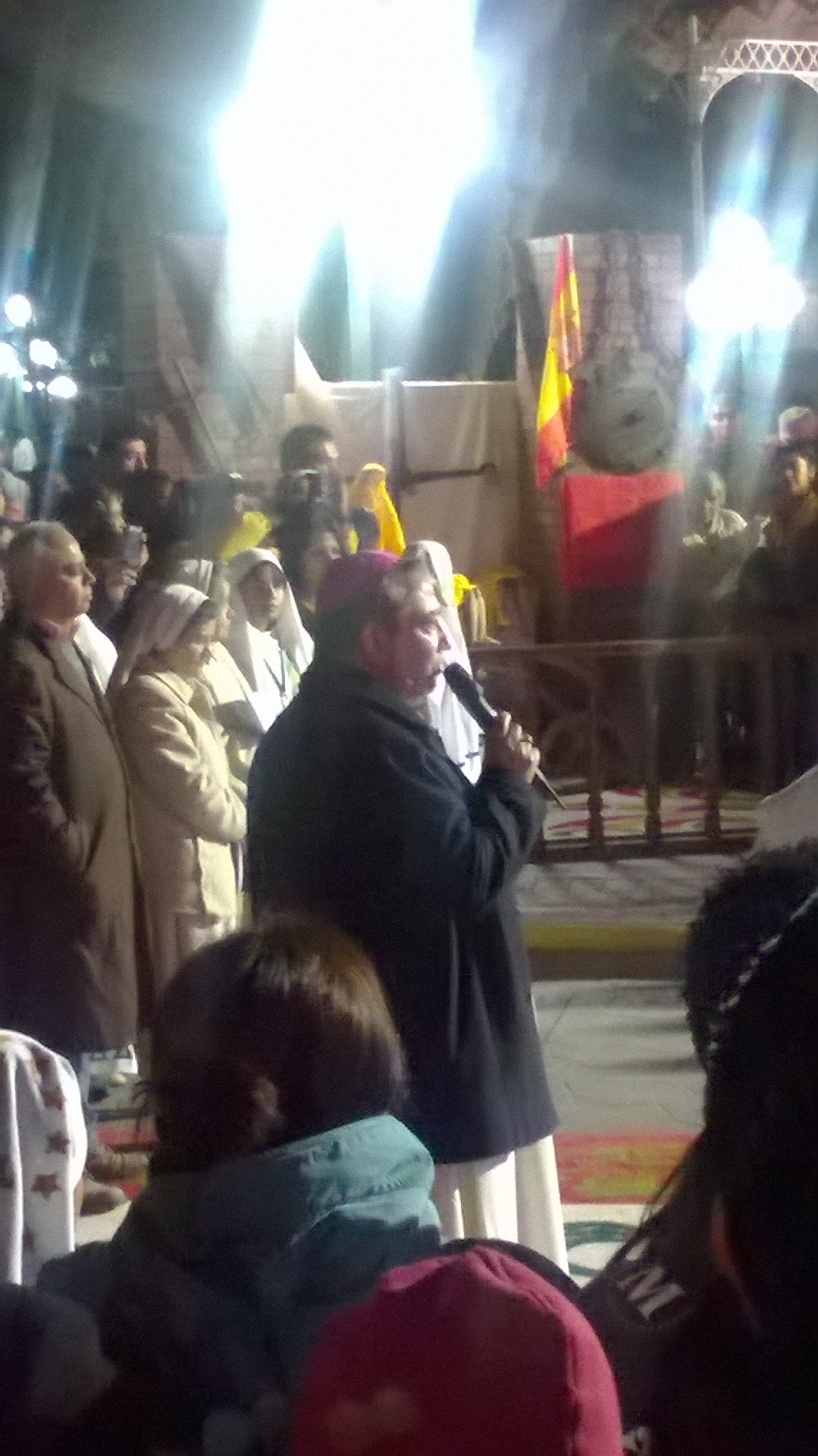 Mons. Francisco Moreno Barrón en La Noche que Nadie duerme en Huamantla, Tlaxcala en 2015